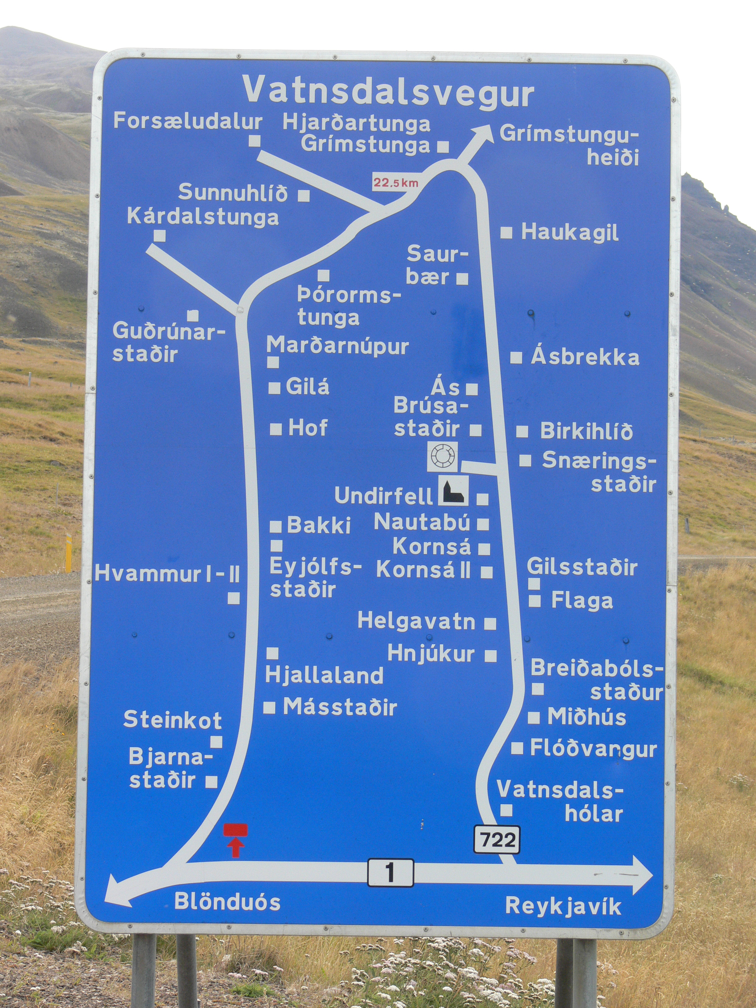 Vatnsdalur Orientierungstafel